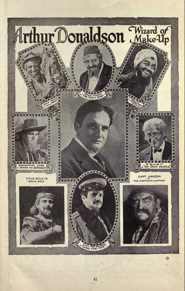 Article de presse professionelle